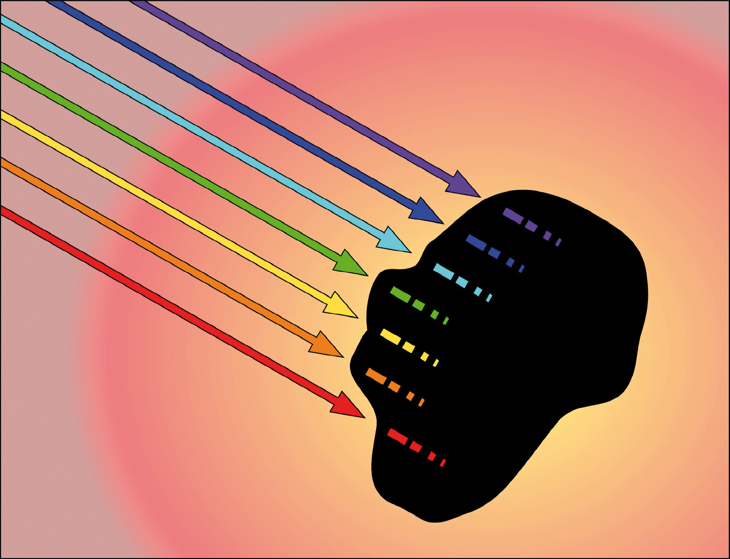 Koloreak ikusten dugu materiak zer argi espektroaren frekuentziak absorbatzen dituen arabera. Materia beltzak, esaterako, hartzen du espektro osoa. Horregaitik gure begietara ailegatzen da beltz kolorekoa materia.